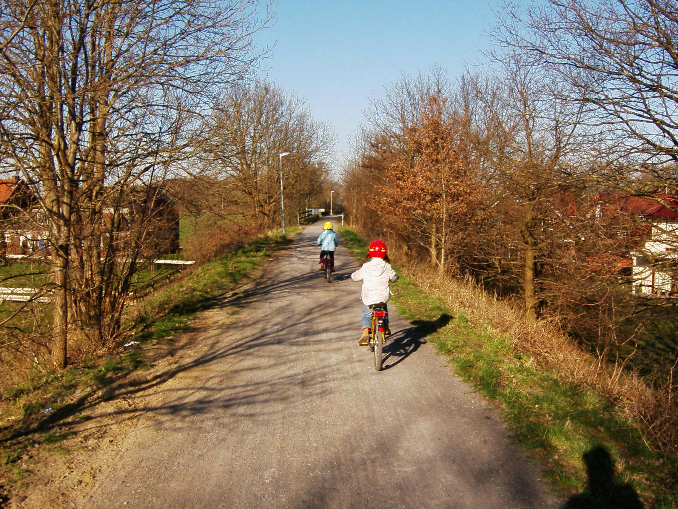 Radweg in Neuenkirchen auf dem Bahndamm der ehemaligen Strecke Rheine - Ochtrup